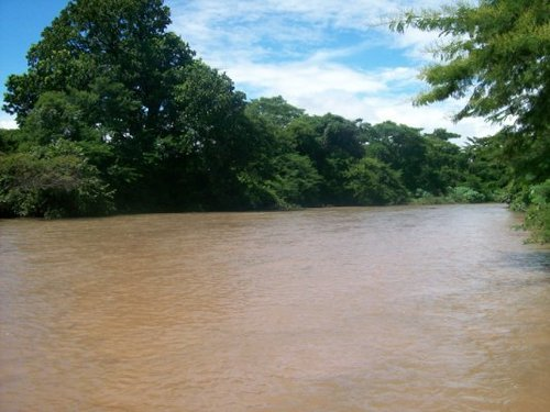 esta es una foto muy linda de nuestro rio aqui en el departamento del cesar